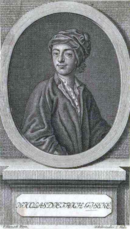 Nikolaus Dietrich Giseke (1724–1765)